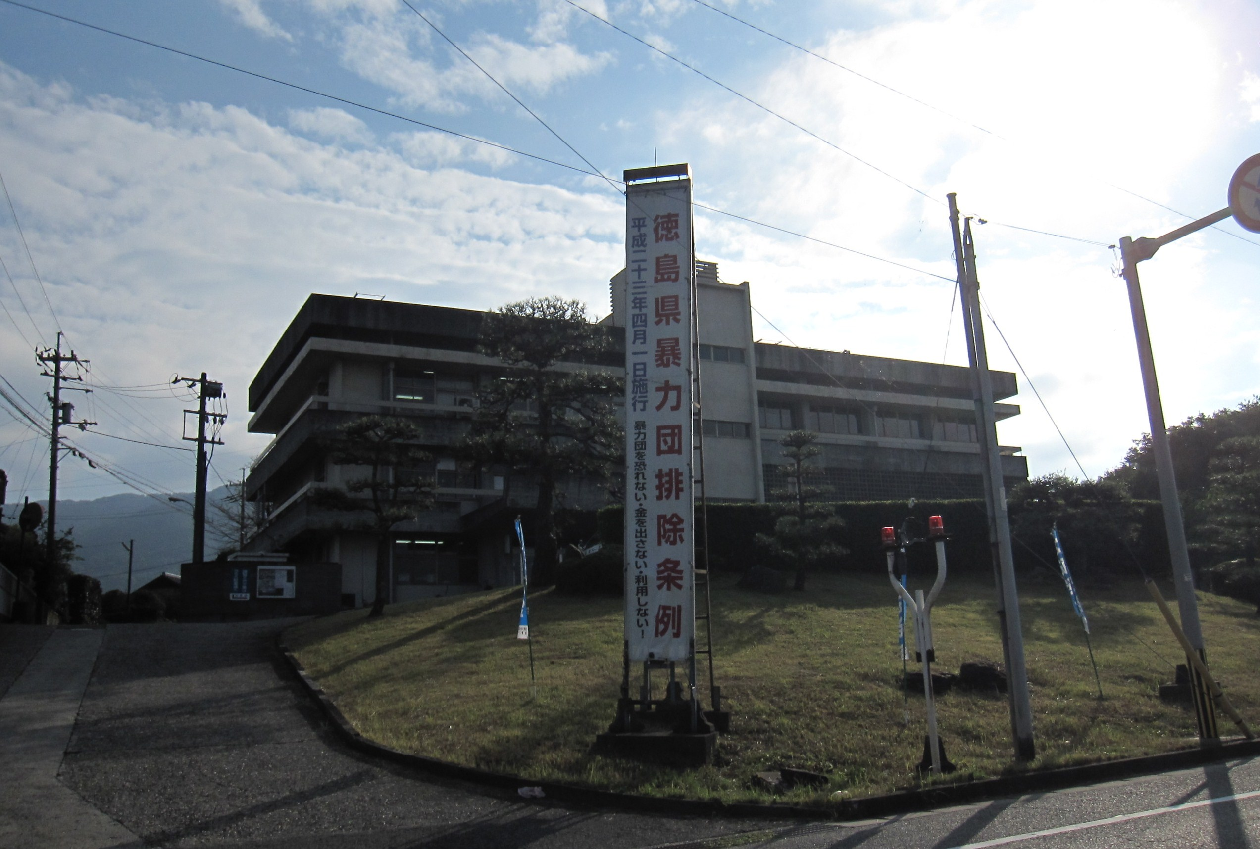 阿波吉野川警察署